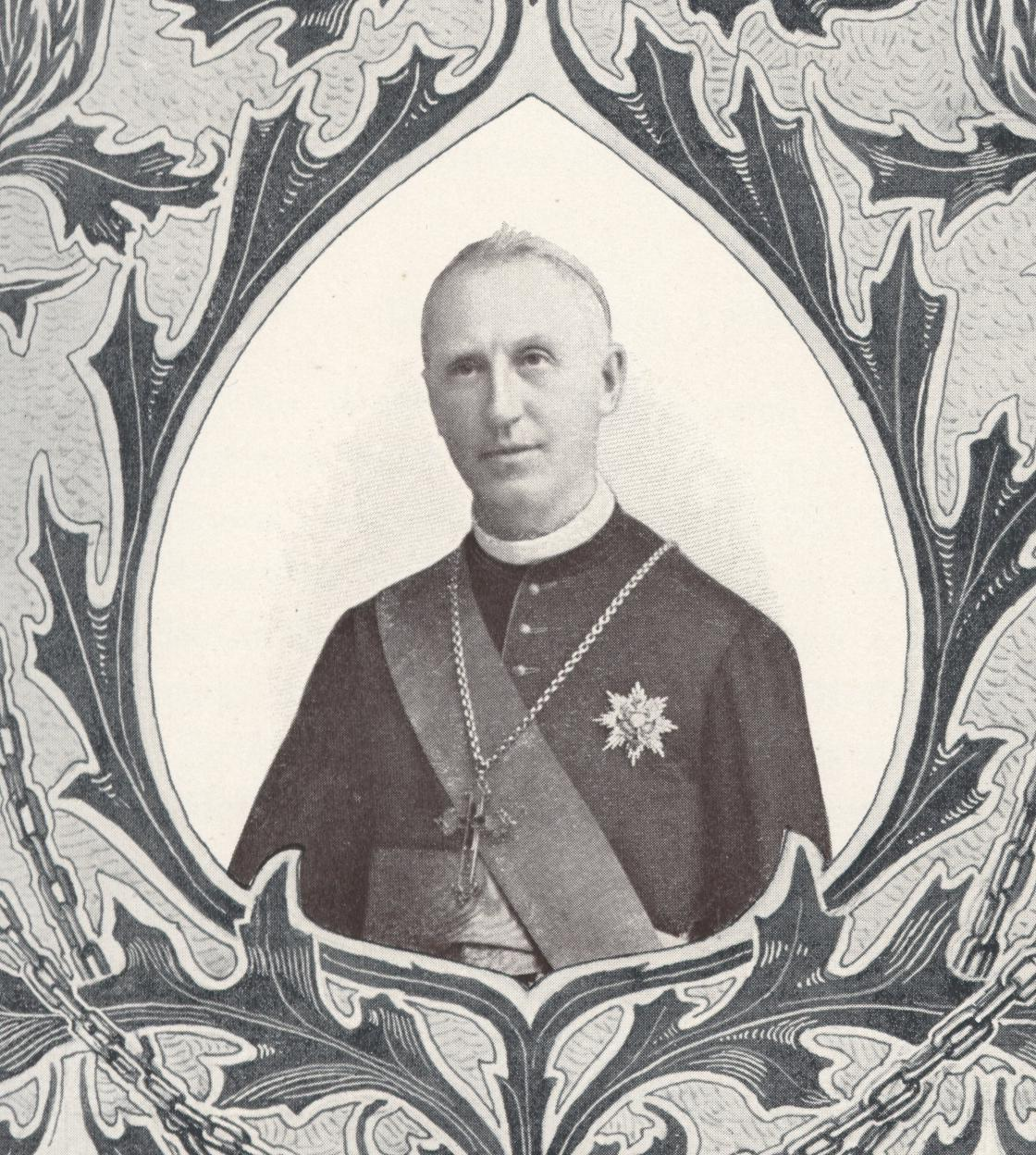 Dr. Joseph Stadler, Erzbischof von Sarajewo